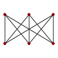 Representació de K3,3, exemple de graf no planar